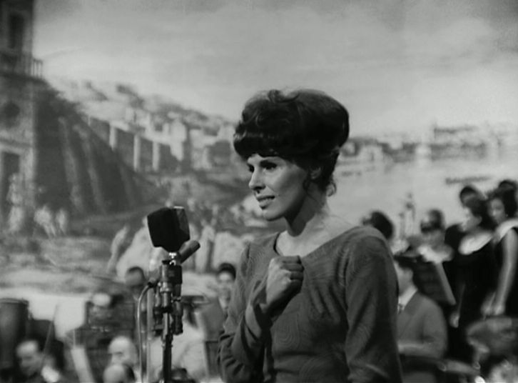 Ornella Vanoni al Festival di Napoli 1964 Licensing Categoria:Immagini di Ornella Vanoni